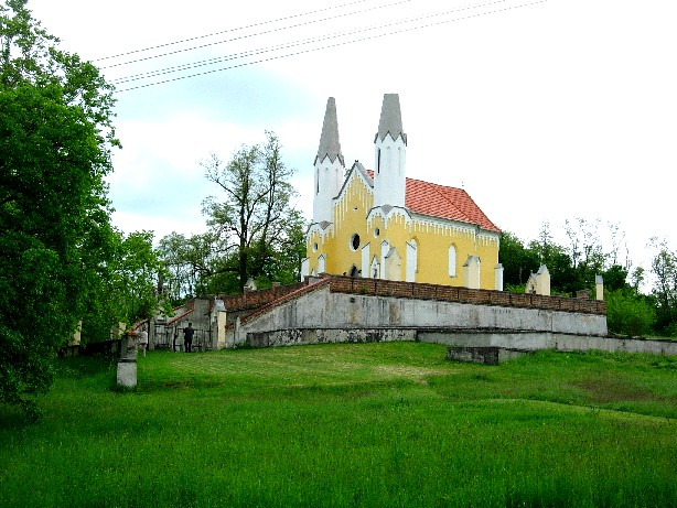 Sitkei kápolna